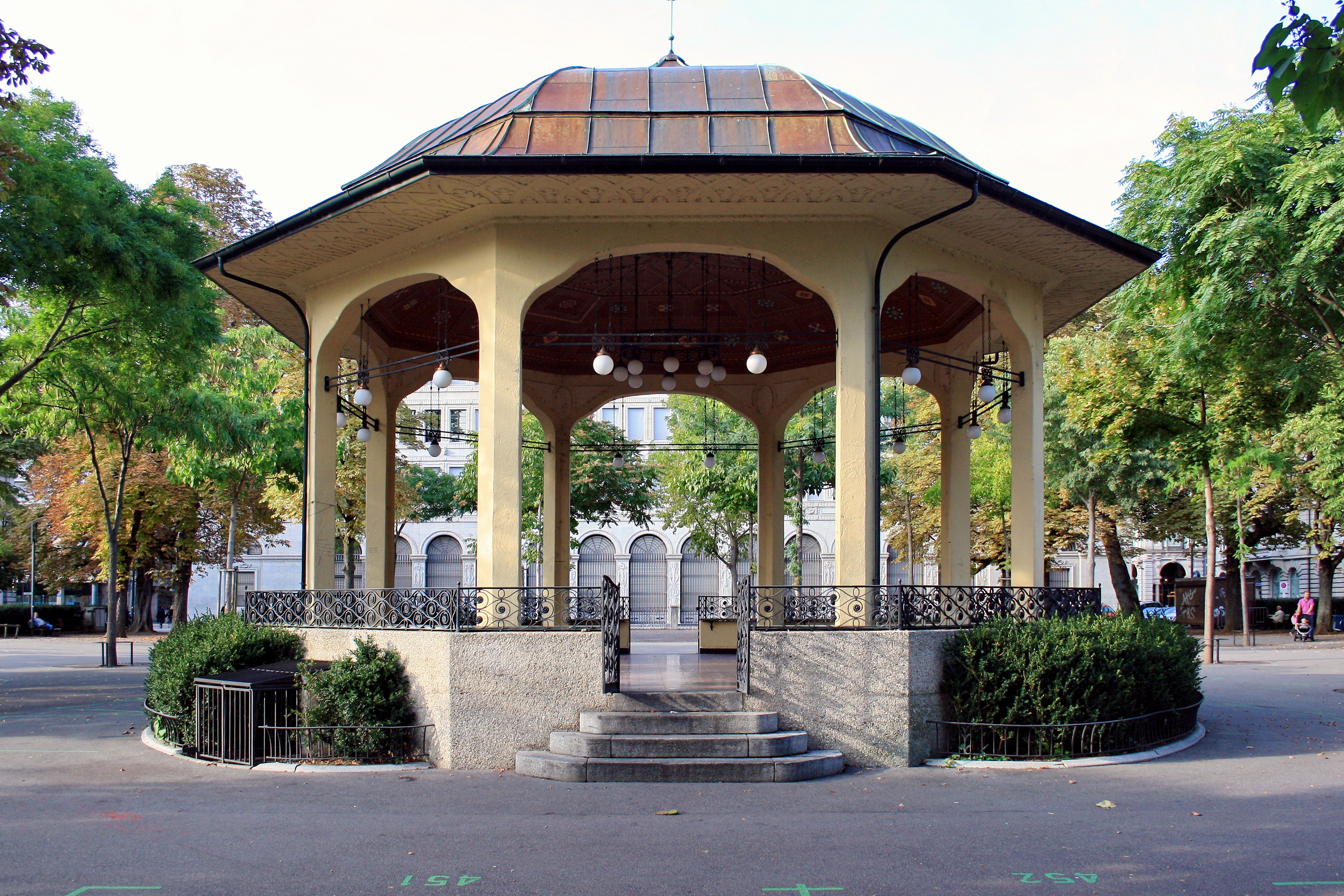 Bürkliplatz in Zürich (Switzerland), Schweizerische Nationalbank in the background.